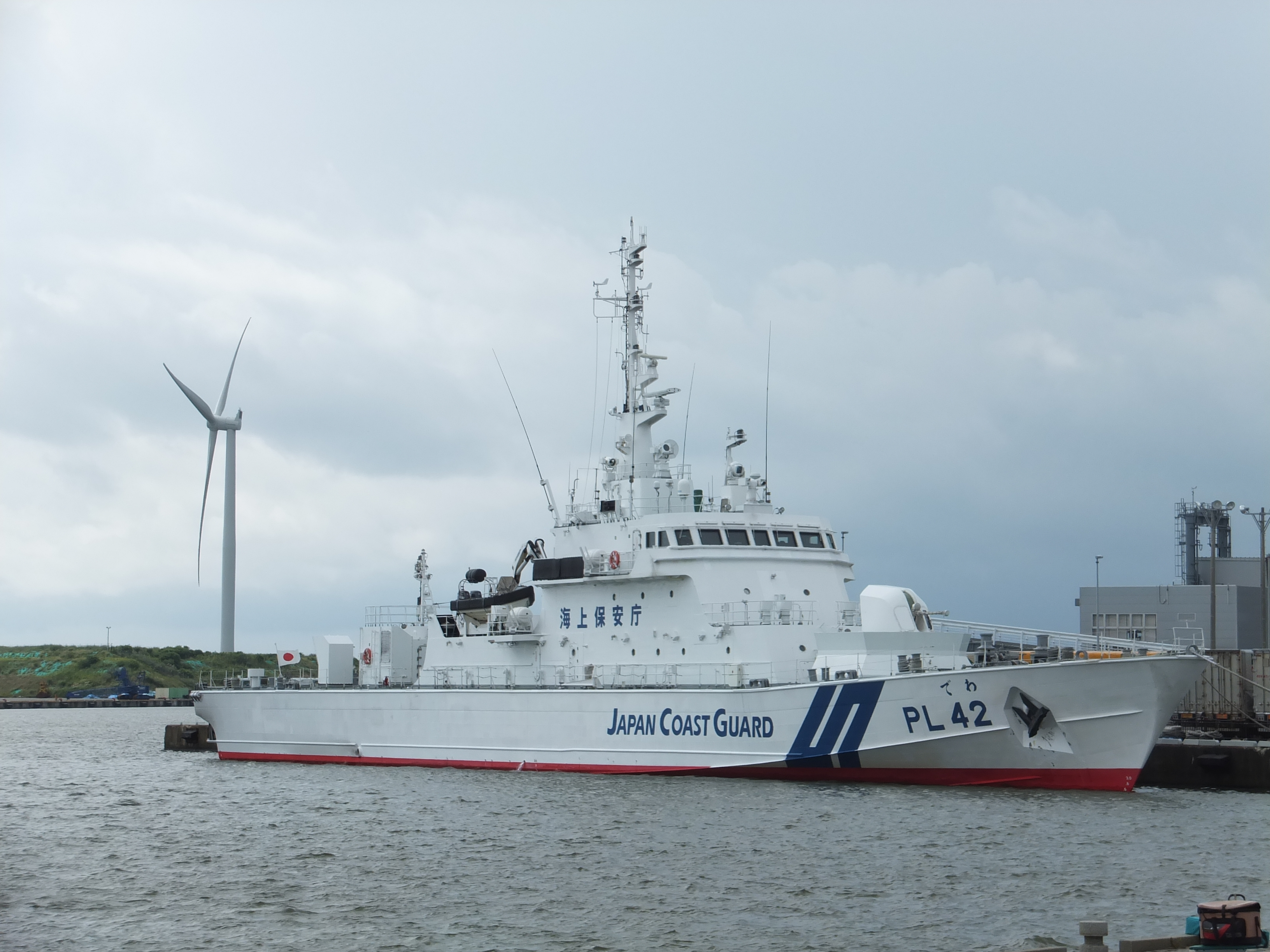 あそ型巡視船PL-42「でわ」